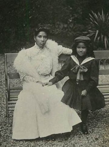 S. M. Ranavalona, la petite princesse Marie-Louise, photographe René Gautier rue de Mareil à Saint-Germain-en-Laye.